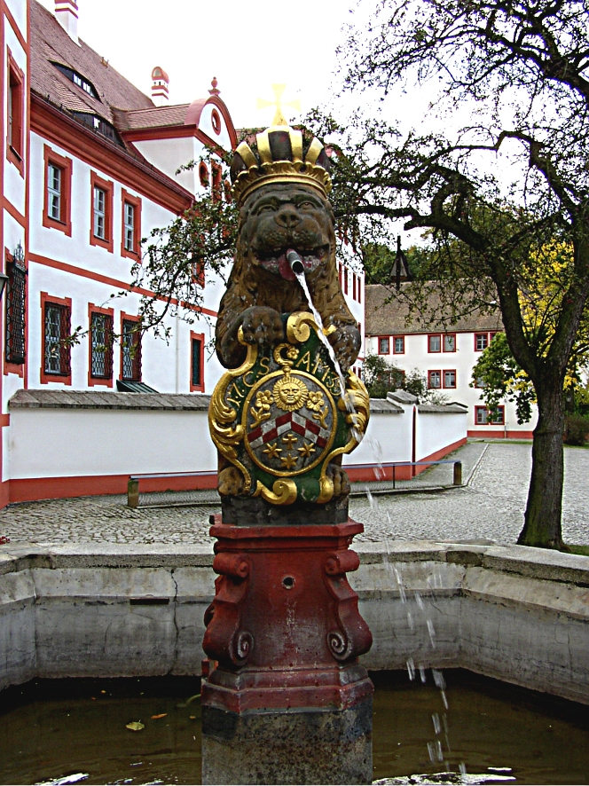 Der 1720 vor der Kirche errichtete Brunnen besitzt als Brunnenfigur einen aufrecht sitzenden, gekrönten Löwen. Er erinnert an die traditionelle Schutzherrschaft des Königreiches Böhmen. (Uwe Fiedler)